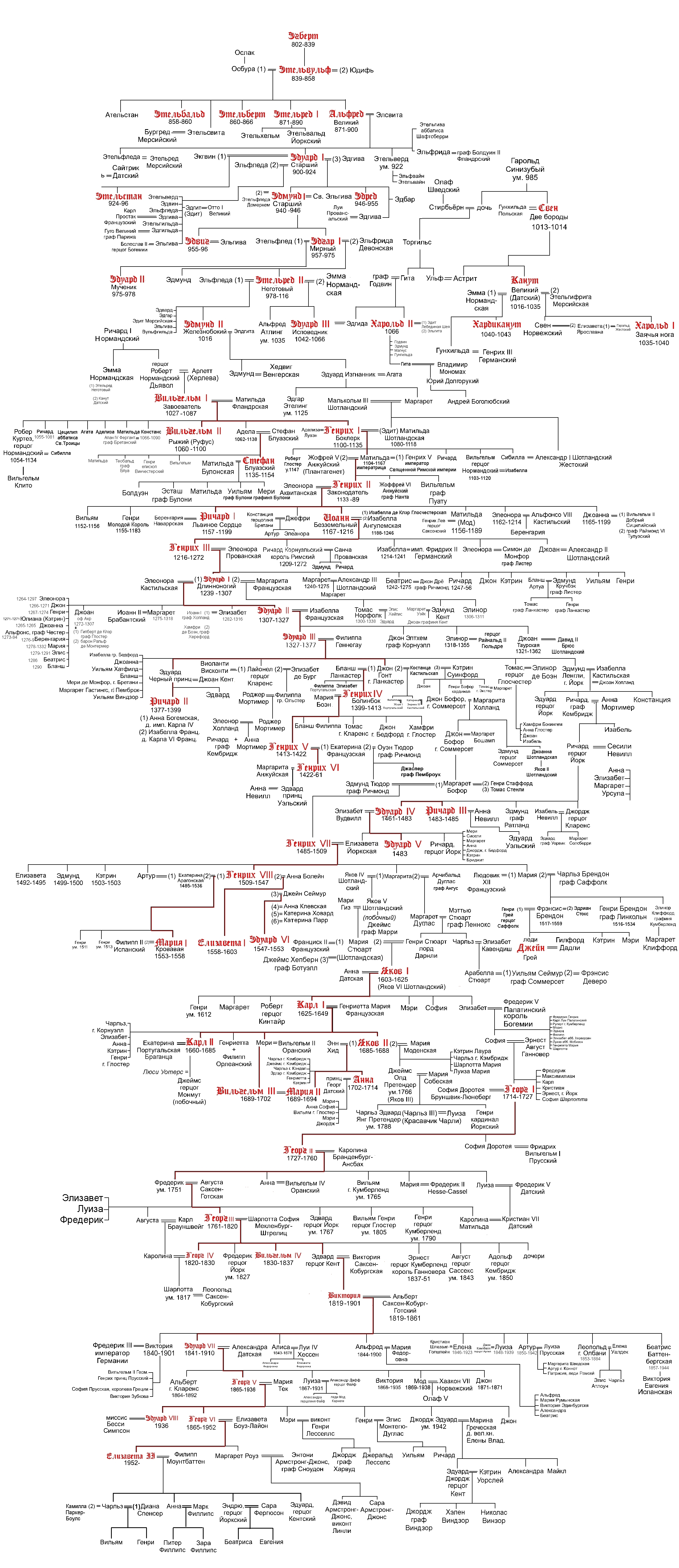 Родословие британских королей